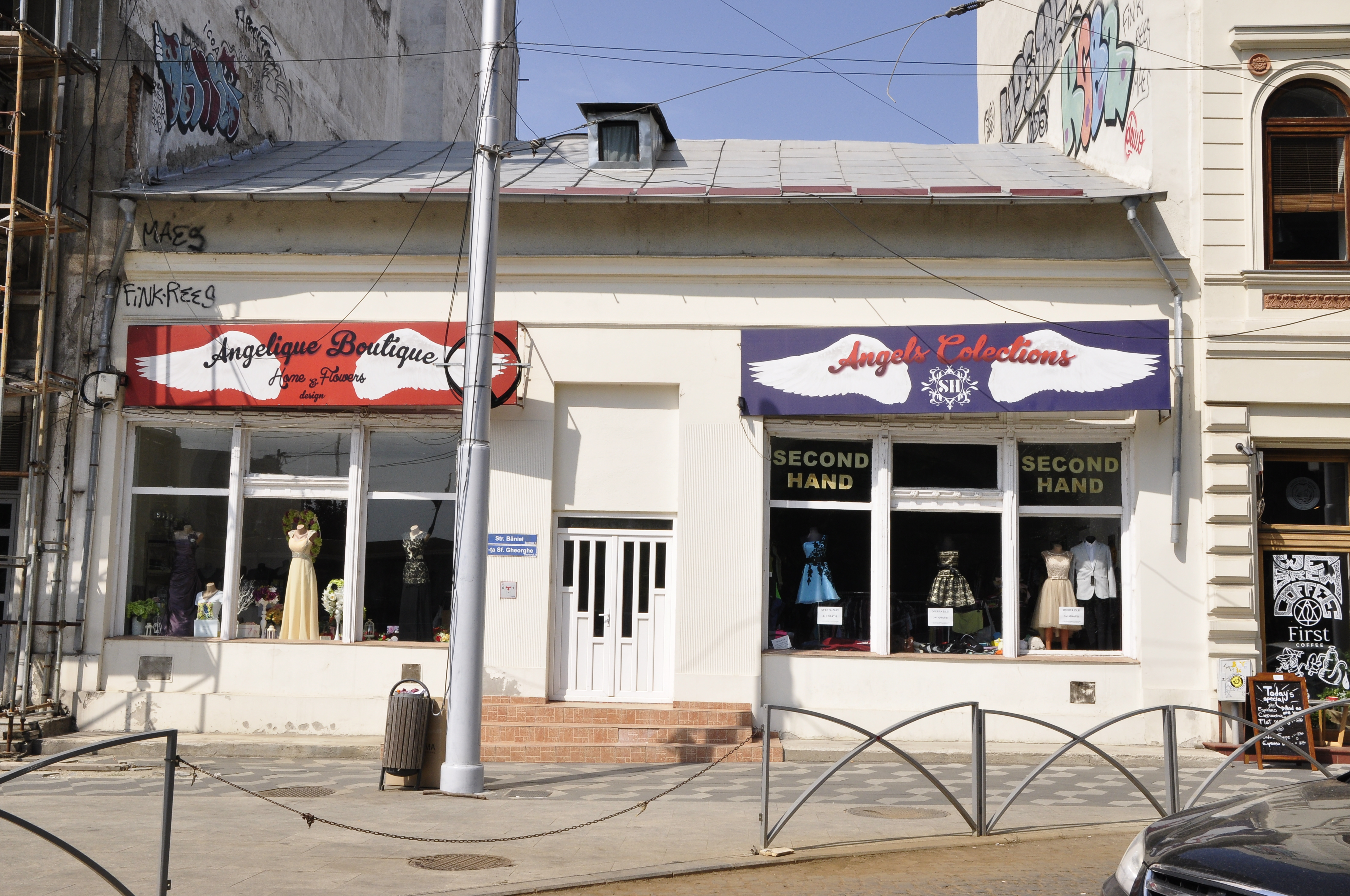 Casă cu prăvălie